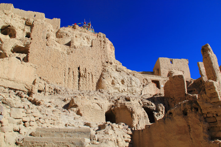 西藏古格遗址